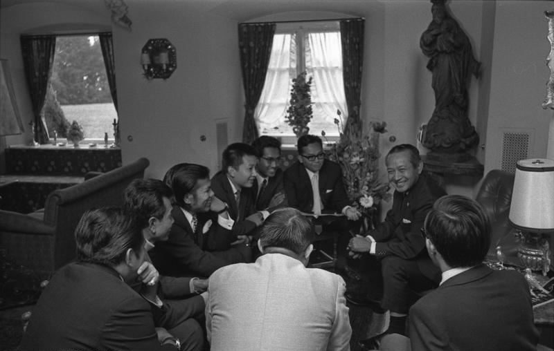 Staatsbesuch - Indonesien, Präsident Suharto in Berchtesgaden (Gut Schubert)